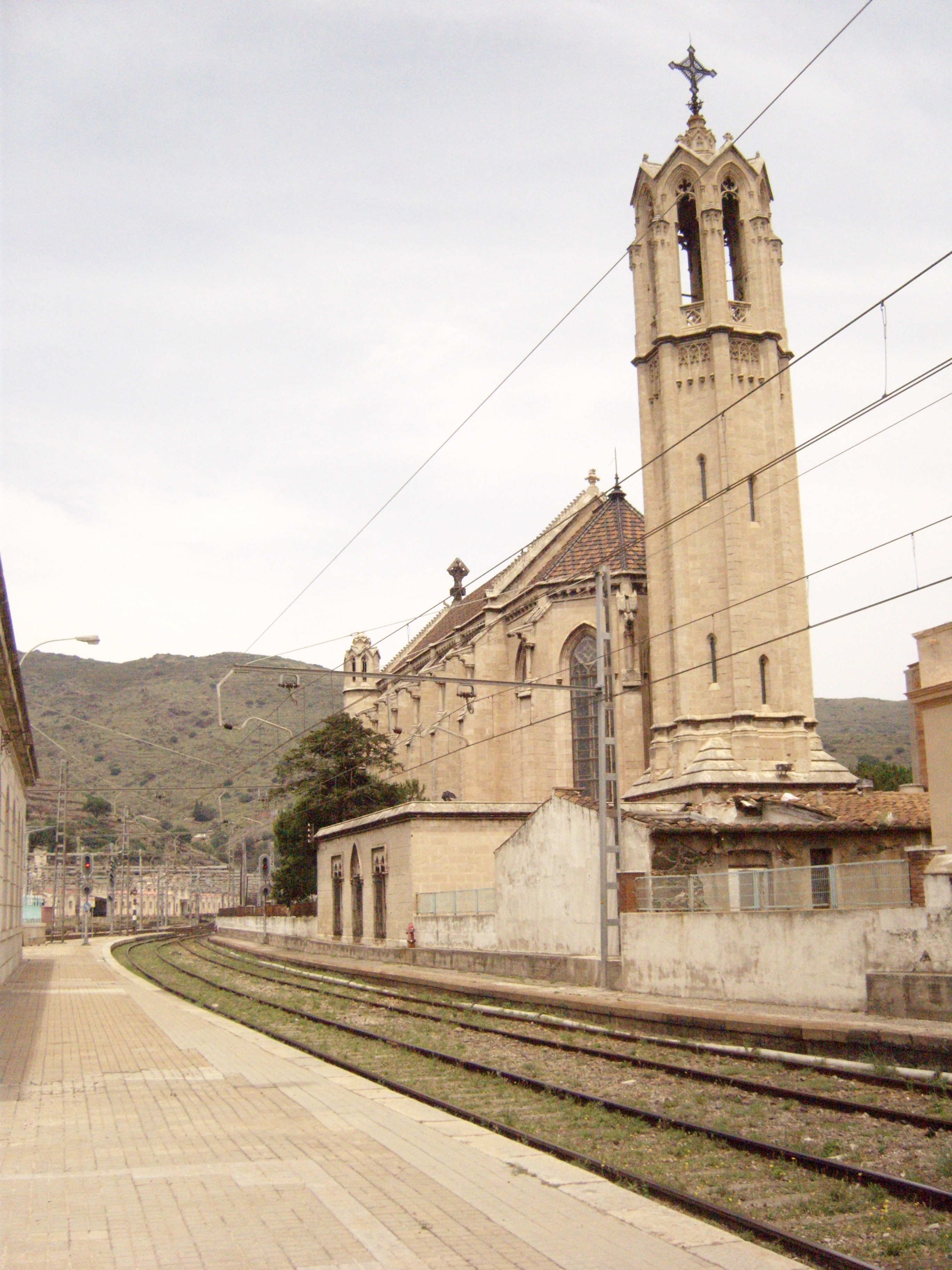 Església de Santa Maria de Portbou - vista des de l'estació